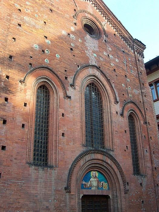 Chiesa di San Bernardino alle Monache a Milano.